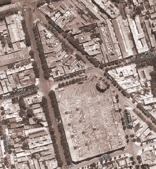 Vista aérea de la terminal tranviaria en lo que luego fue El Olimpo